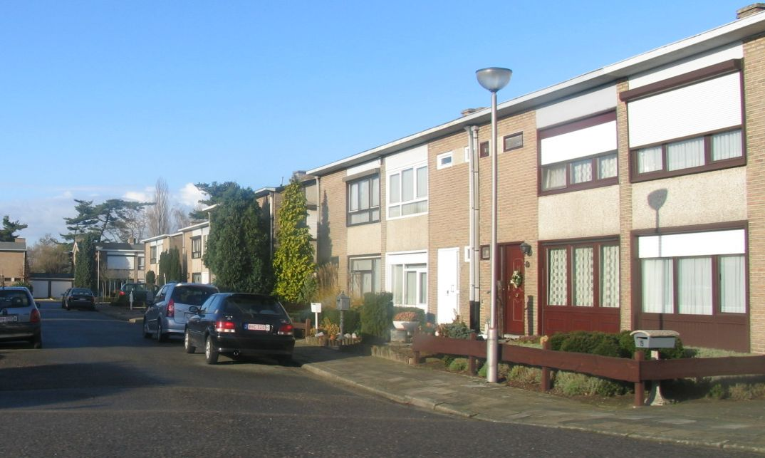 Mechelen, Kauwendael. Foto Marc Alcide 25 december 2005